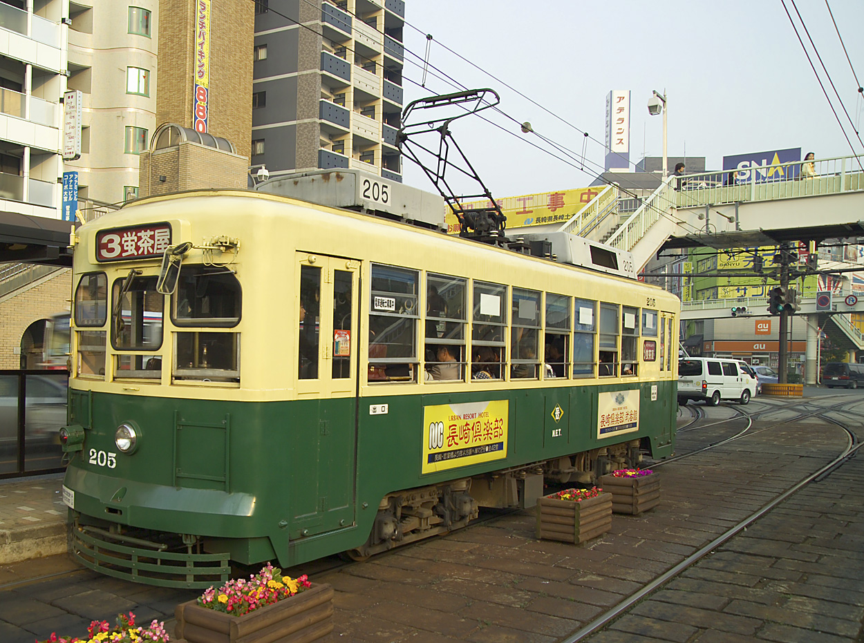 Streetcar of Nagasaki Electric Tramway, Nagasaki, Nagasaki, Japan